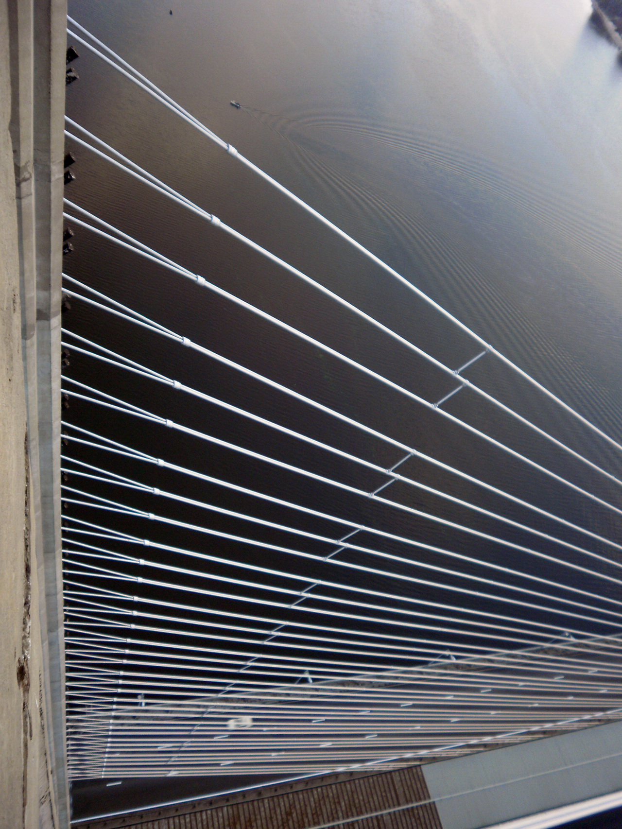 Південний міст у Києві: під